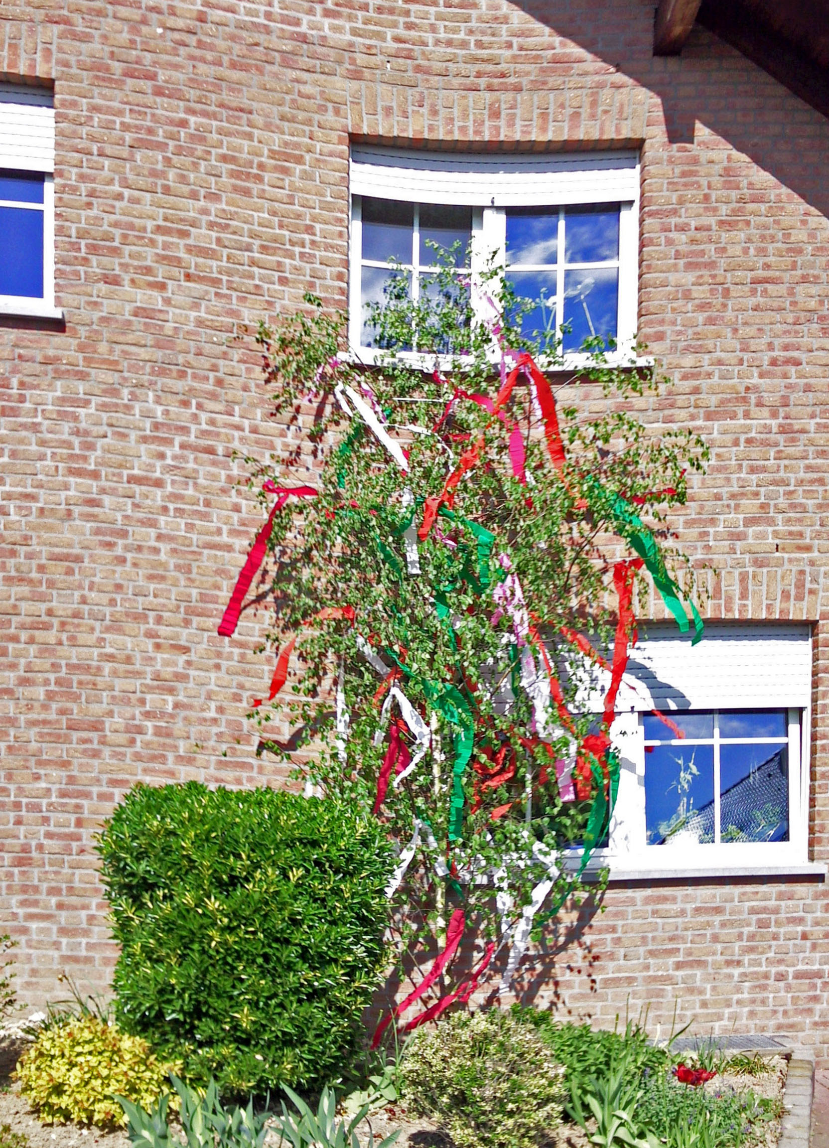 geschmückter Birkenast